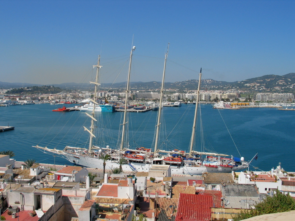 Ibiza harbour